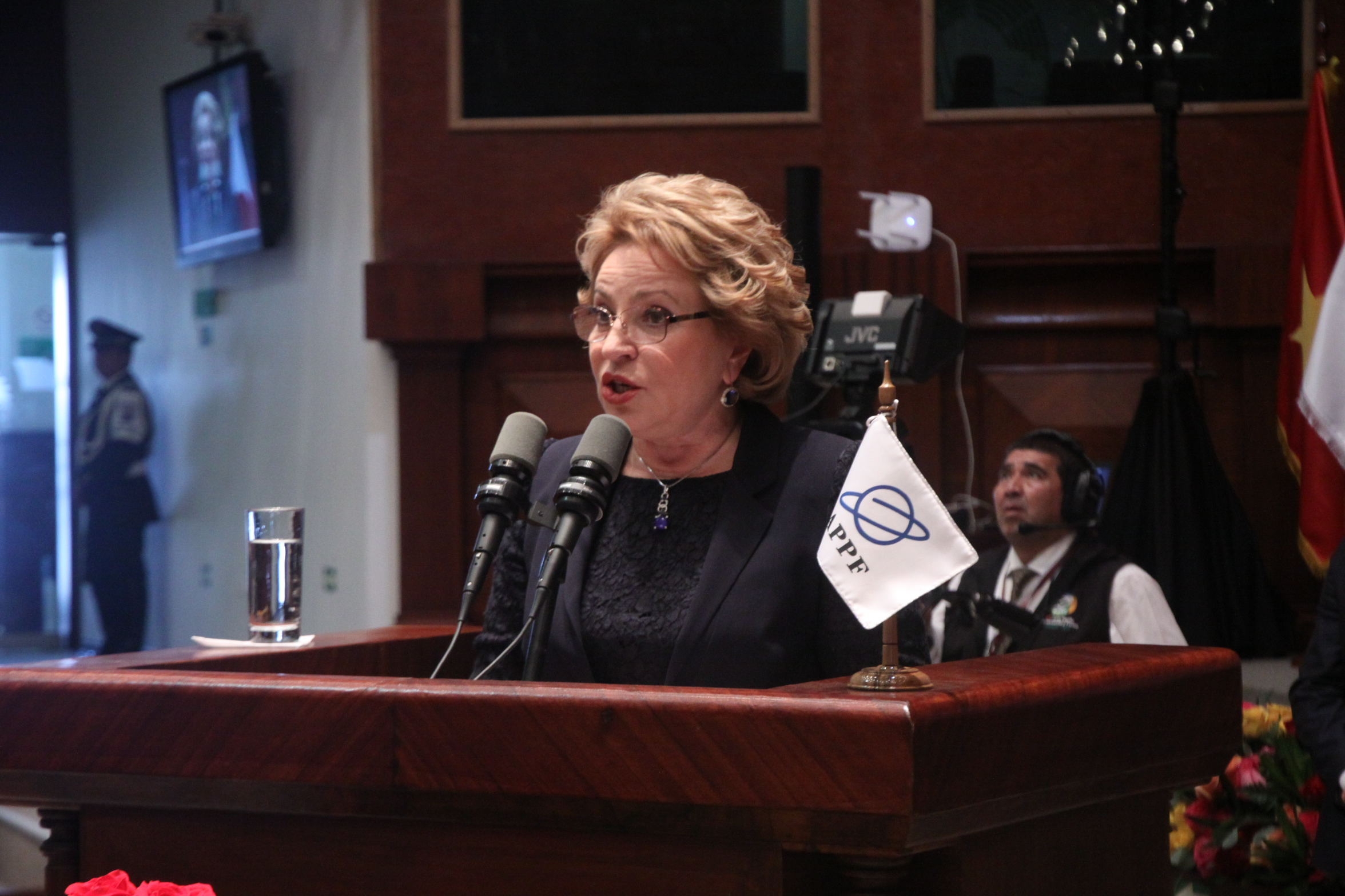 Quito, 12 enero de 2015.- Valentina Matvienko de la Delegación de Rusia interviene en la Primera sesión plenaria y situación internacional: Política y Seguridad Fotografía: Hugo Ortiz / Asamblea Nacional